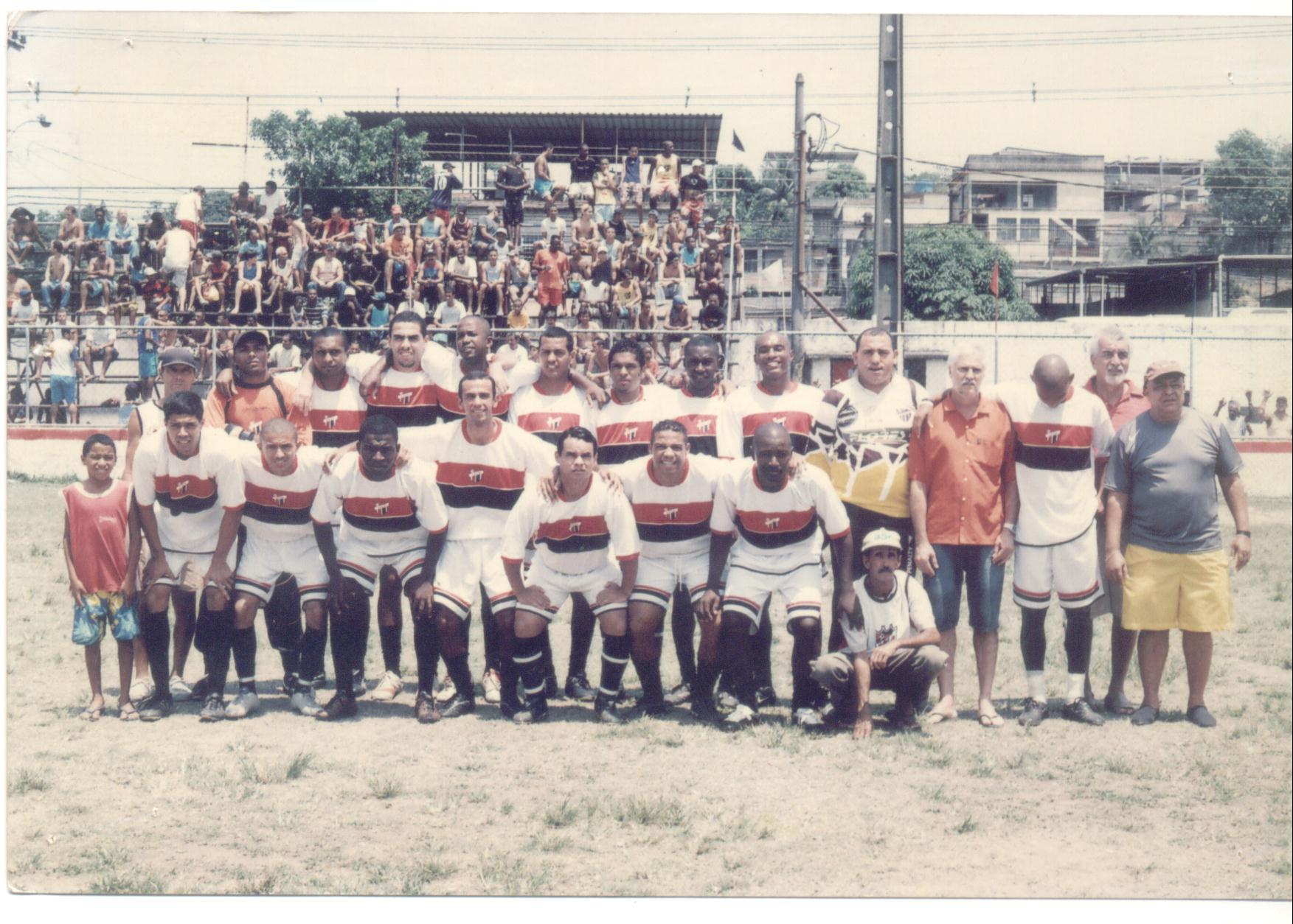 Equipe principal do União Esportiva Coelho da Rocha em 2007.